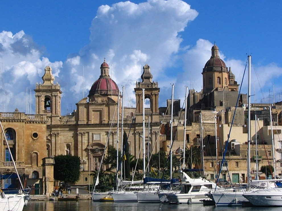 Birgu - Kościół św. Wawrzyńca